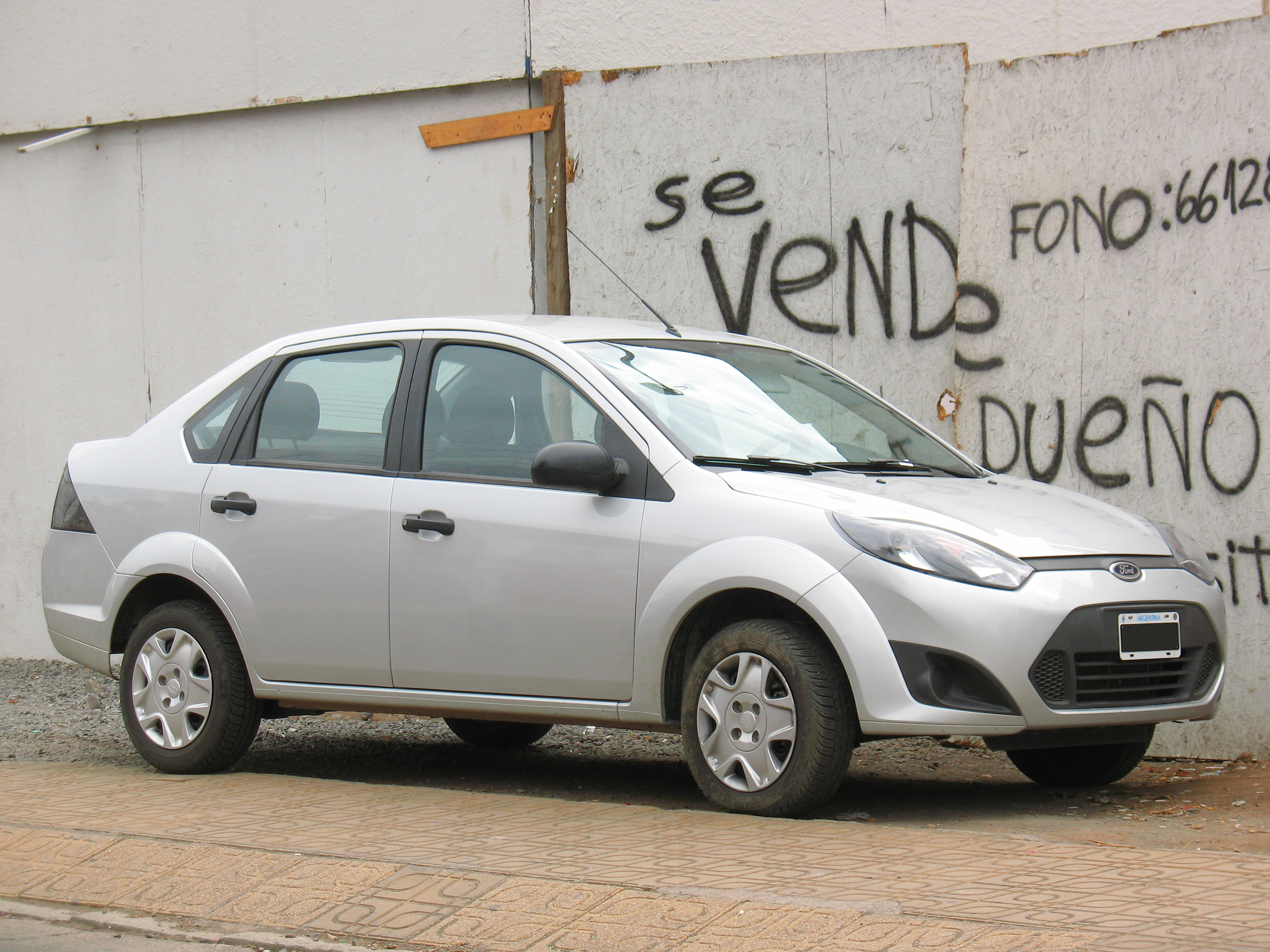 Ford Fiesta Max 1.6 Ambiente 2011